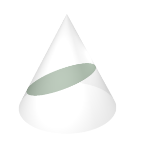 Imagem importada da wikipedia